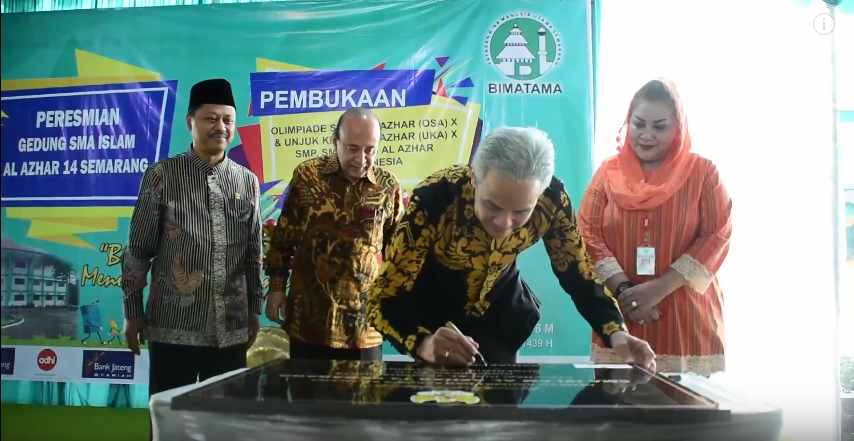 Peresmian gedung SMA Islam Al Azhar 14 Semarang yang dilakukan oleh Gubernur Jawa Tengah Bapak Ganjar Pranowo dengan didampingi oleh Wakil Walikota Semarang Ibu Heaverita Gunaryanti, Pembina Yayasan Bimatama Semarang Bapak Fuad Bawazier, dan Ketua Umum YPI Al-Azhar Bapak Sobirin.